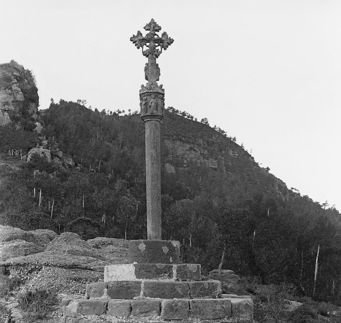 Creu de terme de Cervelló. Rafael Degollada i Castanys (1915)